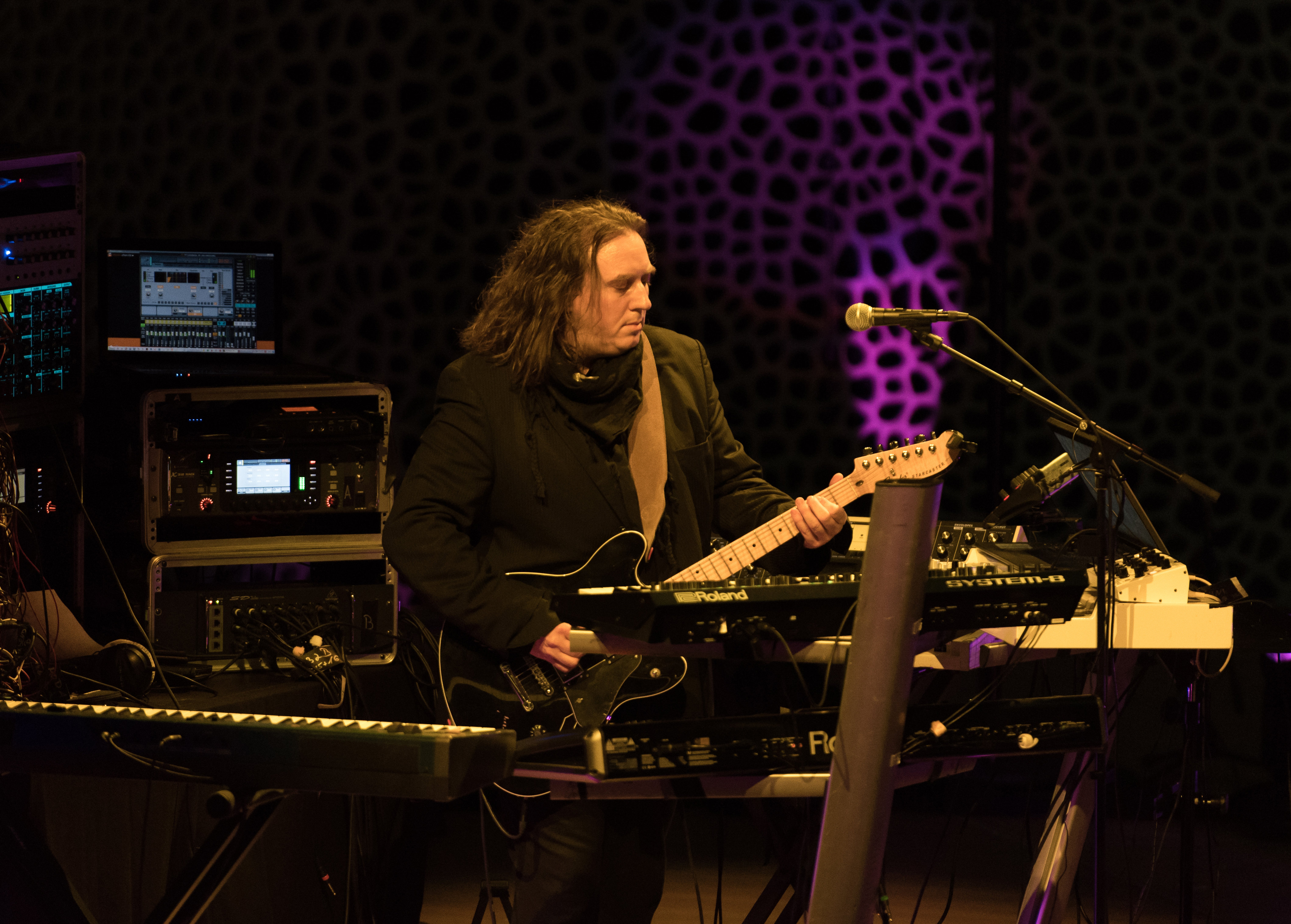 Tangerine Dream bei der Quantum of Electronic Evolution Tour in der Elbphilharmonie Hamburg 2018